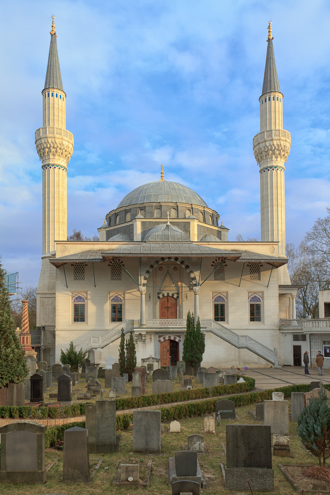 Şehitlik-Moschee in Berlin, 2012